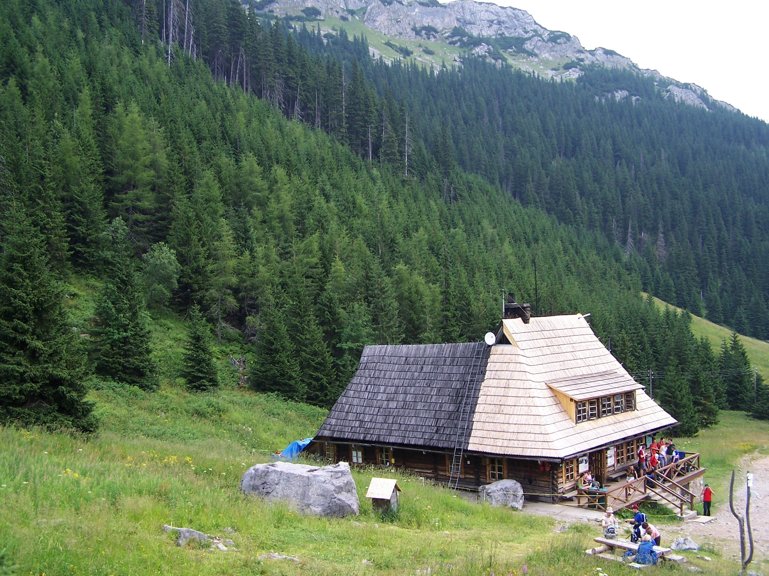 Dolina Kondratowa